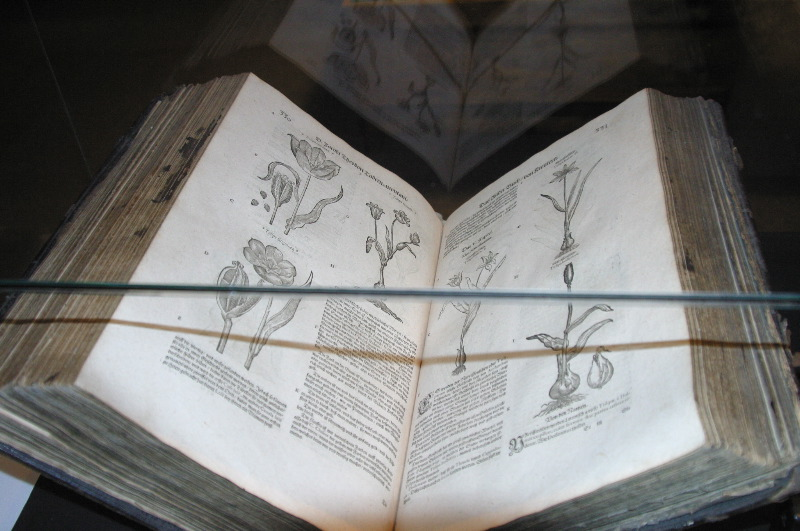 Medisinsk urt: Simon Paulis urtebok.